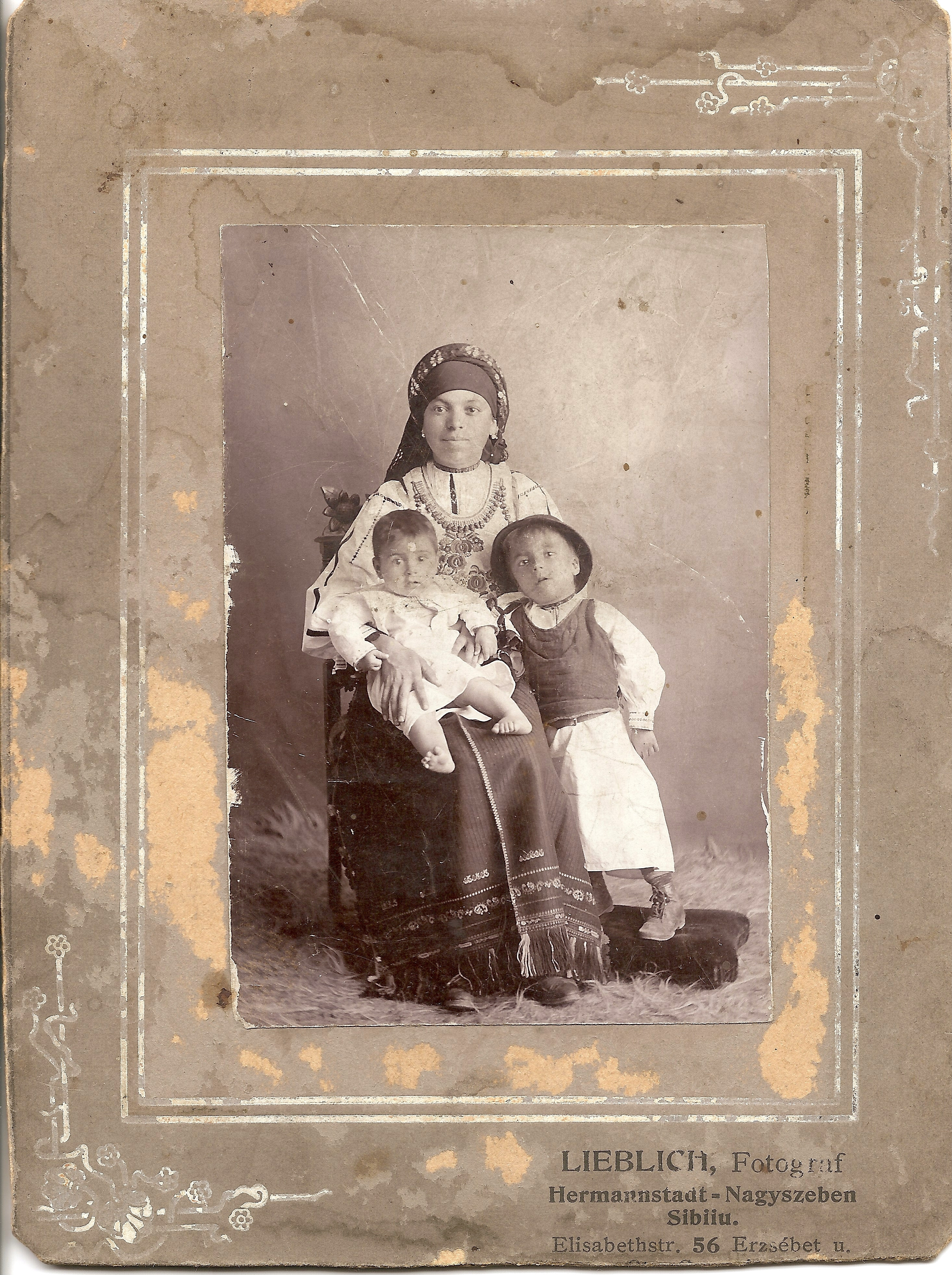 Fotografie trimisã soțului sãu plecat la muncã în America(SUA), prin emisar lui George Macsin din Ohio, în 1910. Fotografia a revenit în România, în 1914. Informații în original, pe verso.